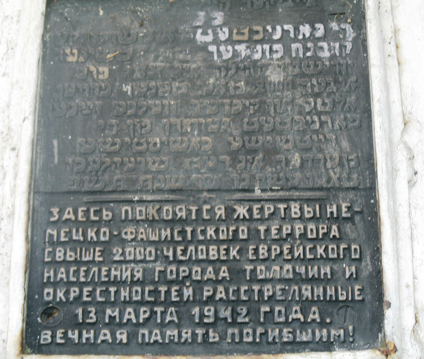 Надпись на памятнике (идиш и русский) на месте расстрела евреев Толочина в марте 1942 года.